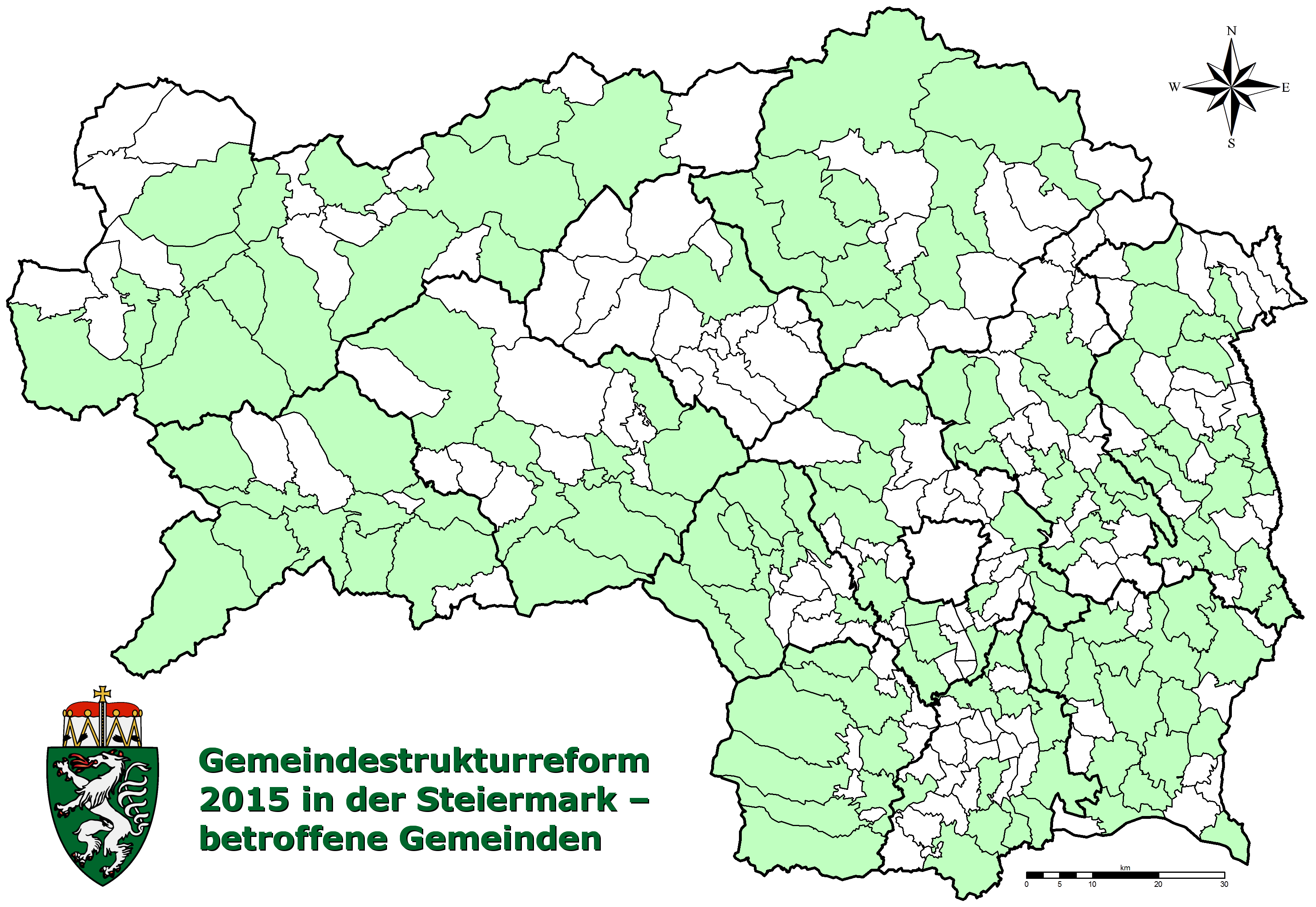 Neu zusammengesetzte Gemeinden in der Steiermark aufgrund der Gemeindestrukturreform 2015